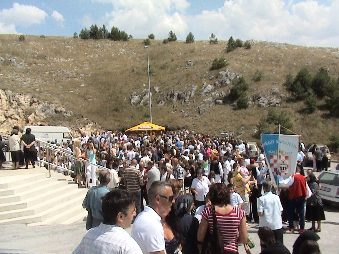 Proslava BDM